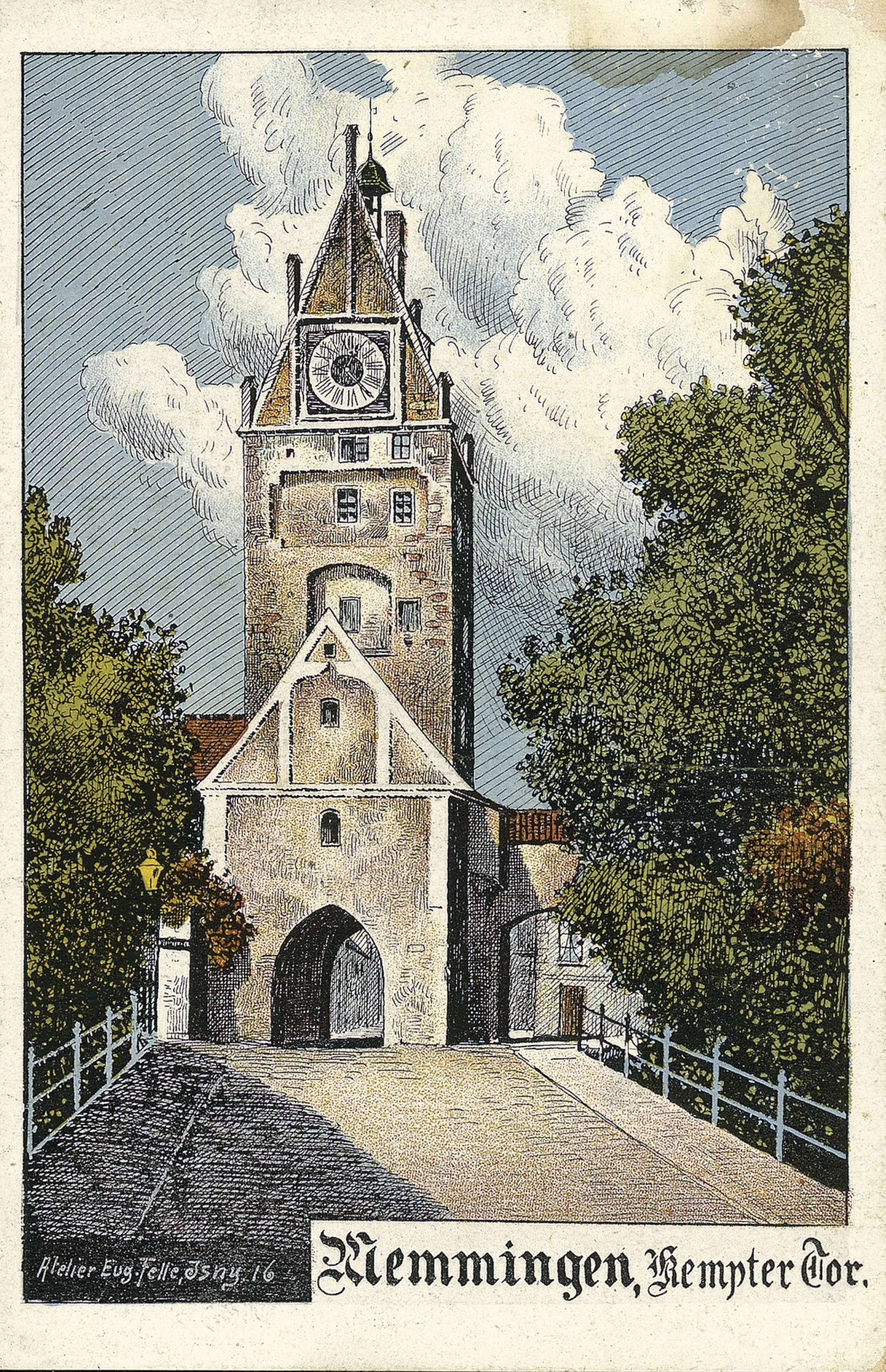 Memmingen, Kempter Tor, 1916